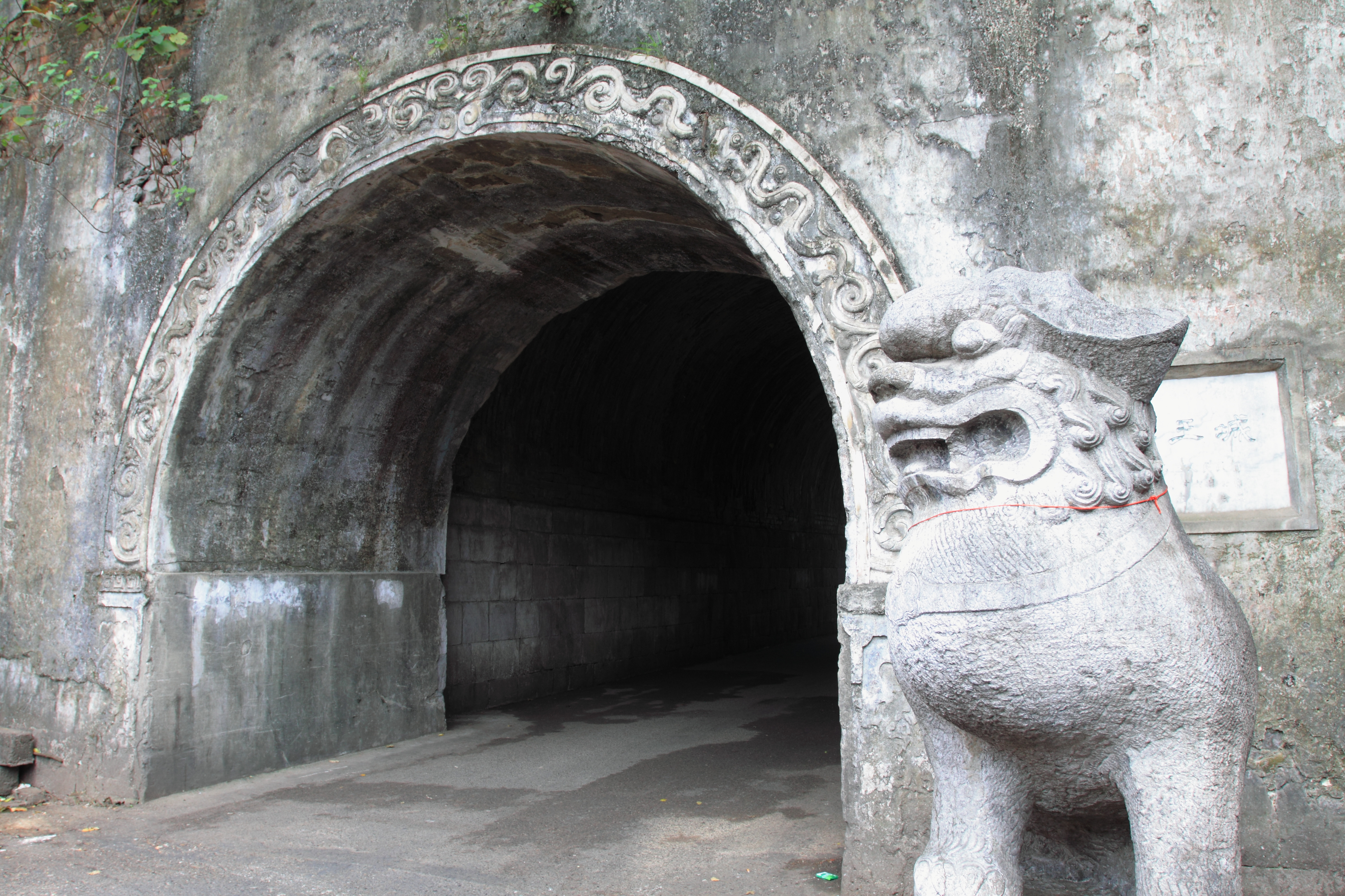 靖江王府南门（端礼门）南侧